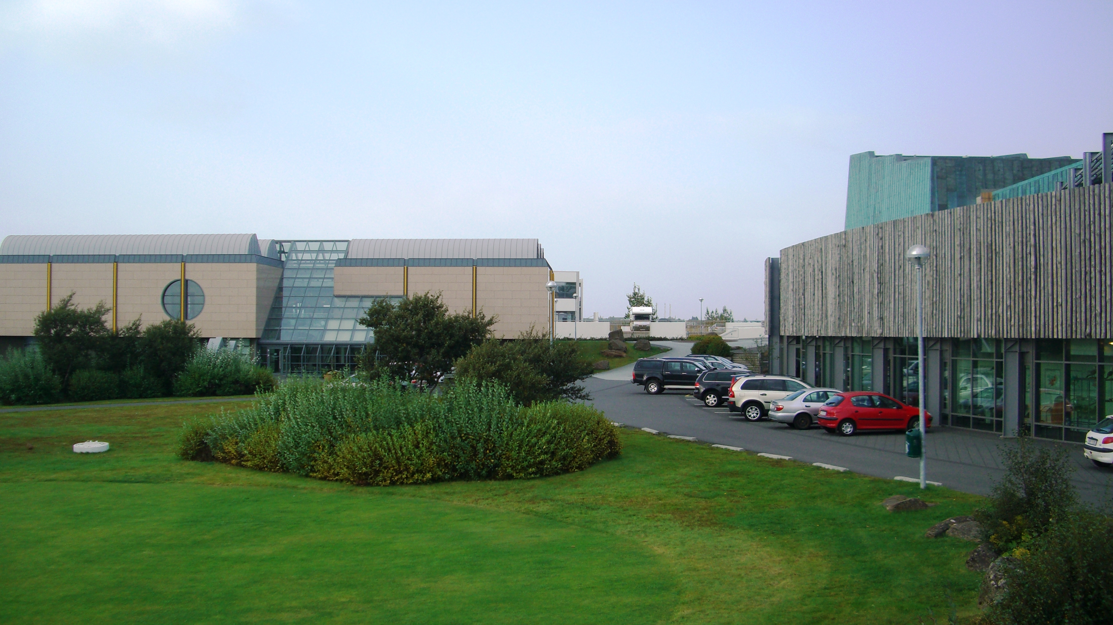 Gerðarsafn, Salurinn og Bókasafn Kópavogs í miðbæ Kópavogs.